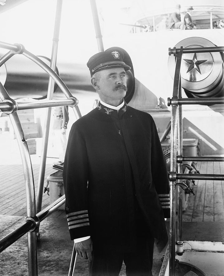 U.S.S. Indiana, Captain Taylor